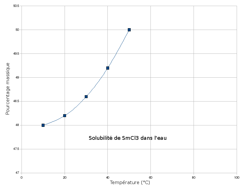 Solubilité de SmCl3 dans l'eau en fonction de la température.